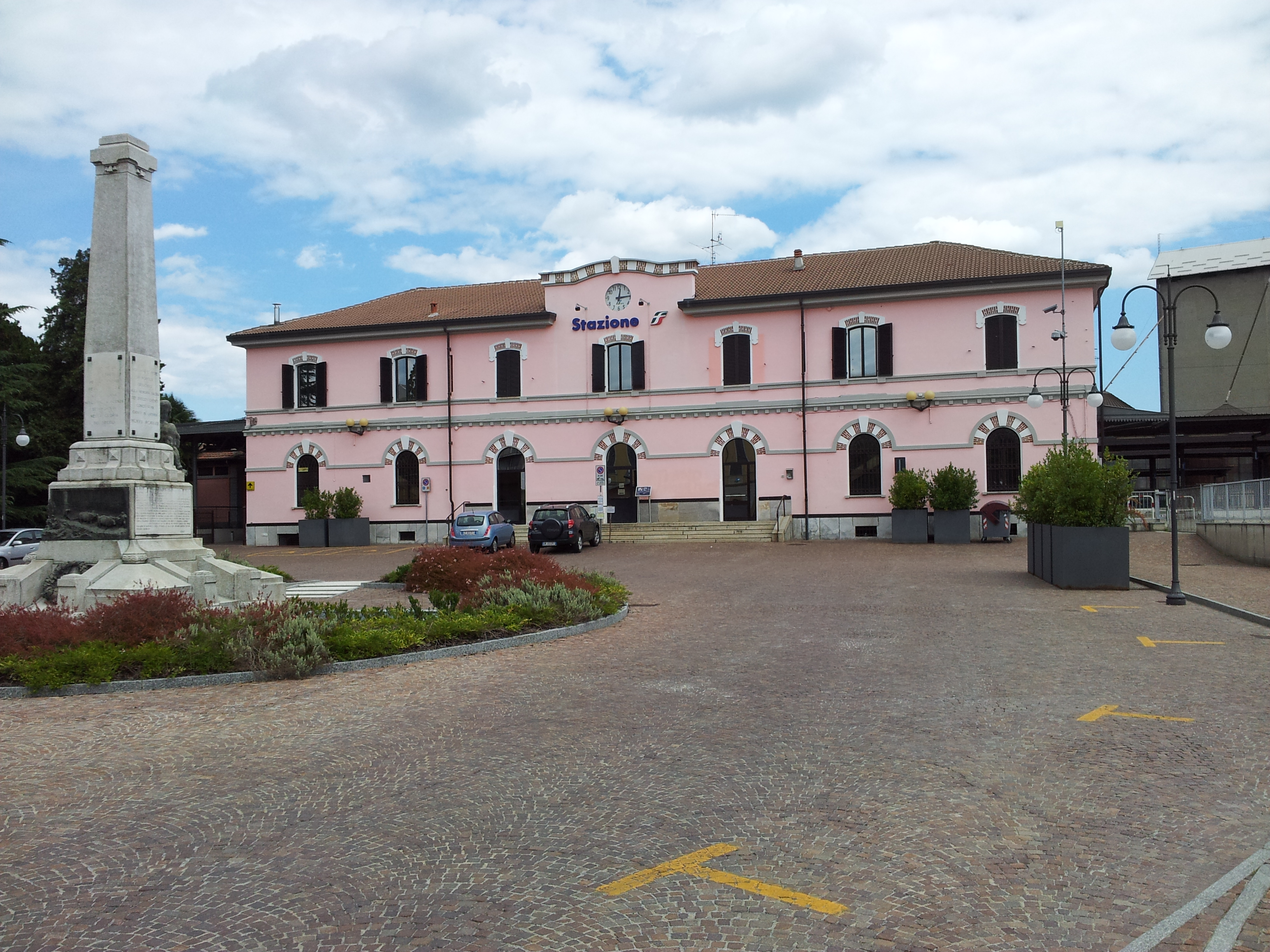 Stazione lato strada.